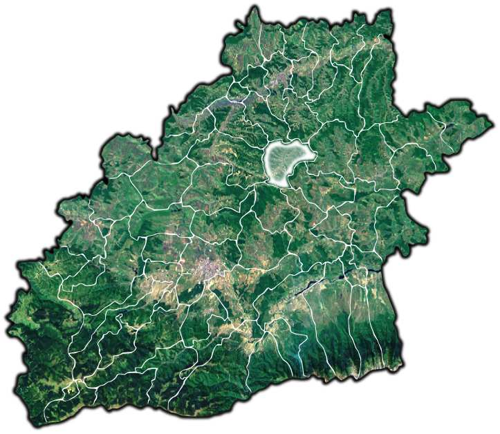 Mihaileni jud Sibiu